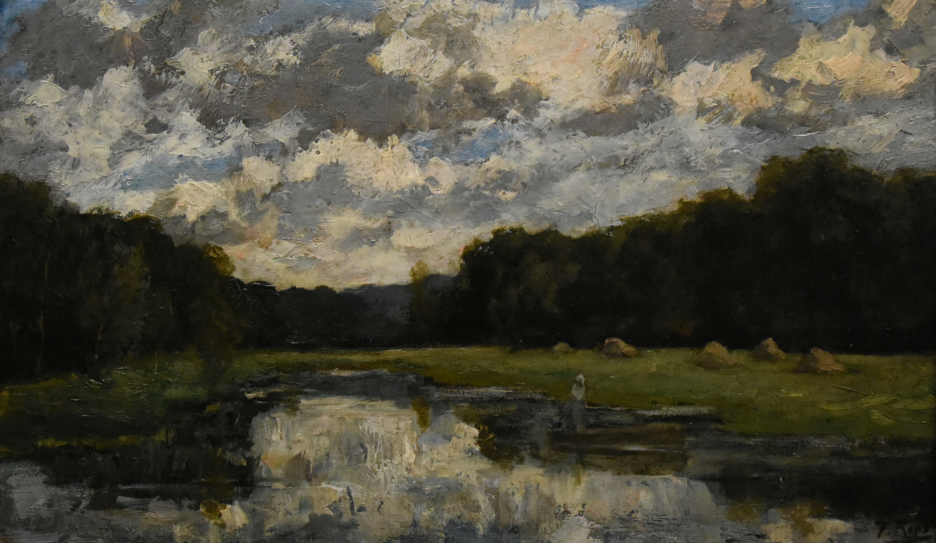 Félicien Rops (1833-1898) Meer van Bambois - Musée Félicien Rops Namen 23-03-2018 This photo of movable heritage has been taken in the Walloon Region